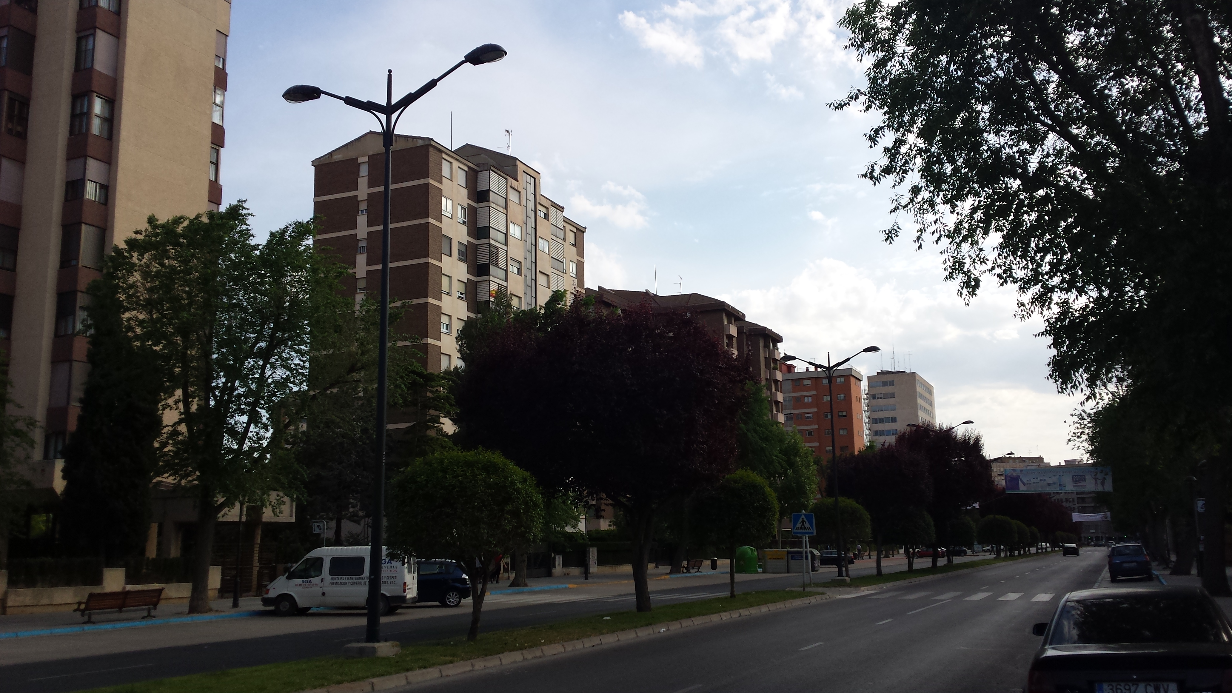 Avenida de la Estación. Albacete